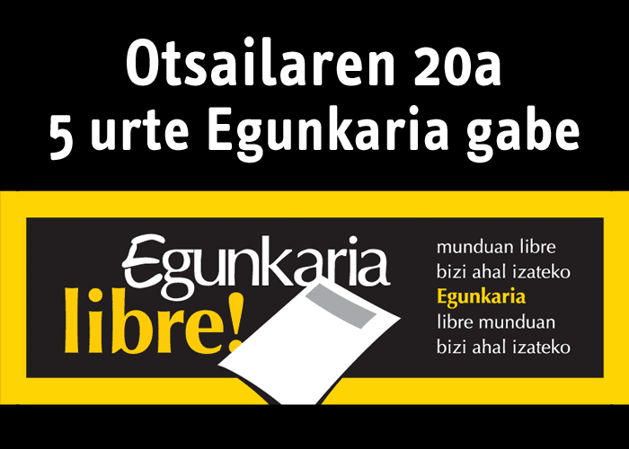 5 urte Egunkaria gabe